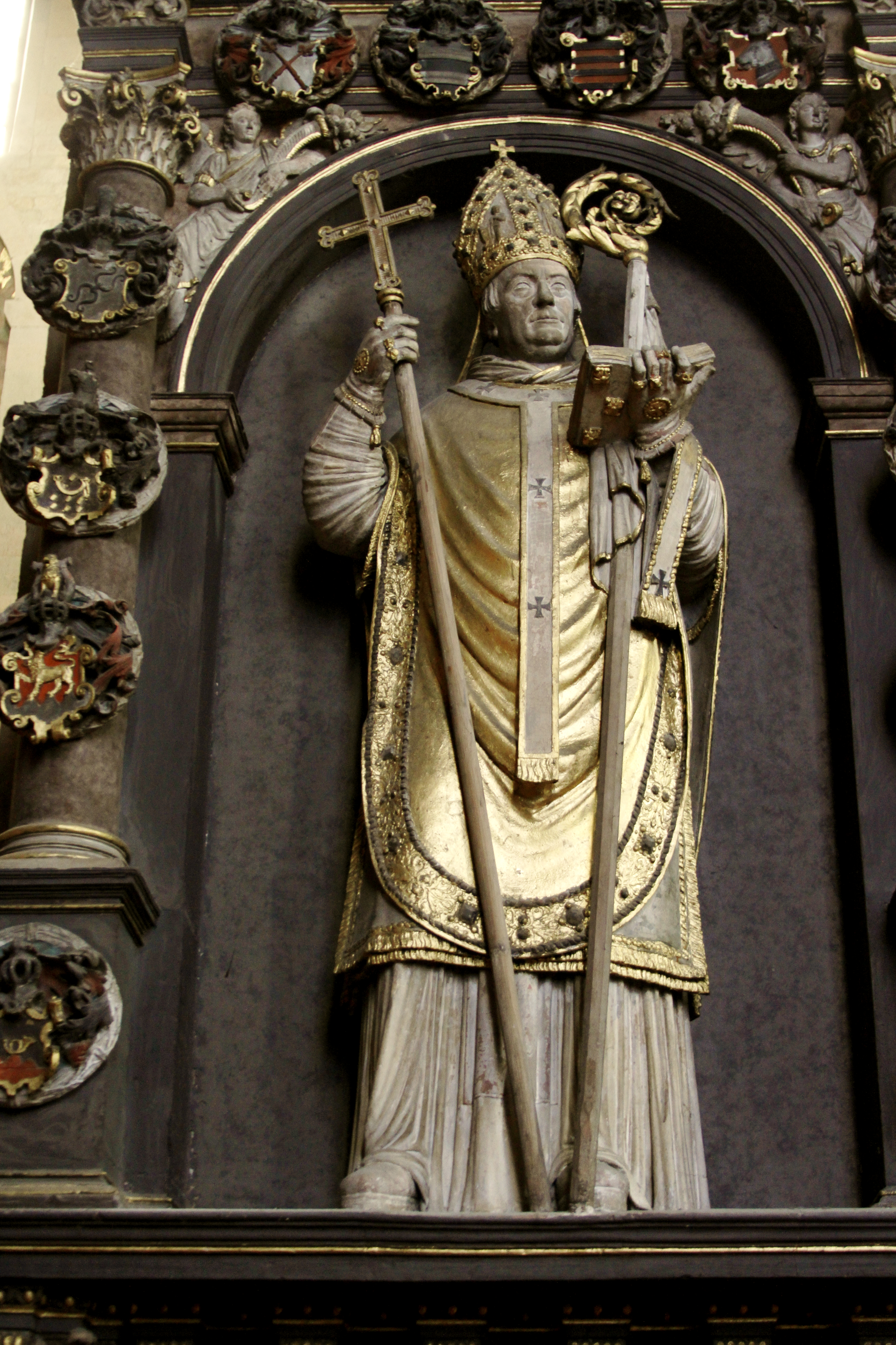 Mainz Cathedral - Mainz - Germany